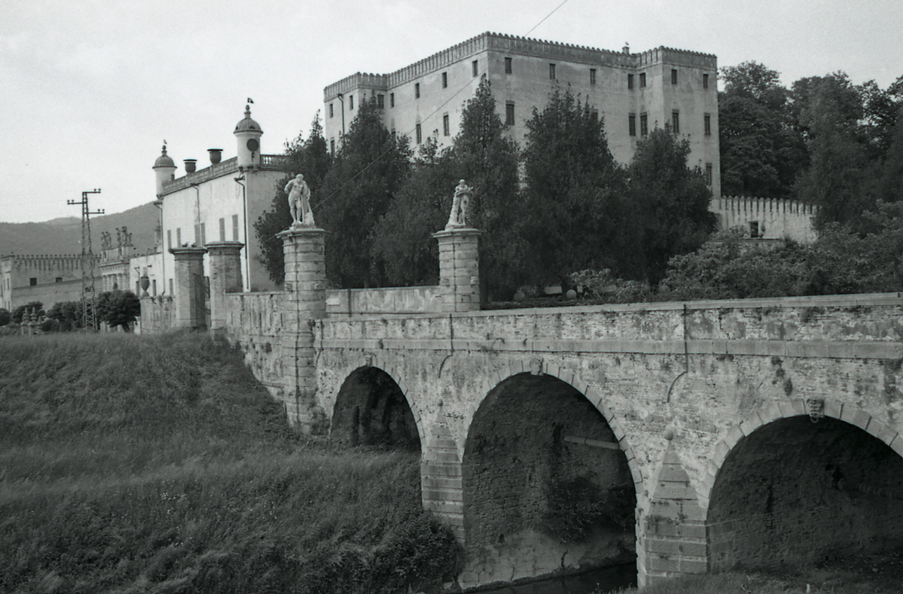 Servizio fotografico : Montagnana, 1967 / Paolo Monti. - Strisce: 7, Fotogrammi complessivi: 37 : Negativo b/n, gelatina bromuro d'argento/ pellicola ; 35 mm. - ((I fotogrammi hanno una doppia numerazione. . - Sul portanegativi: Leica M Adox 21. - Occasione: Pubblicazione: Diego VALERI (a cura di), Padova: i secoli, le ore, Bologna, Edizioni Alfa, 1967. - Fonte: Agenda di Paolo Monti: Monti/ 3 aprile 1966 - 9 marzo 1971/ 12421-16823 (1966-1971), presso Archivio Paolo Monti